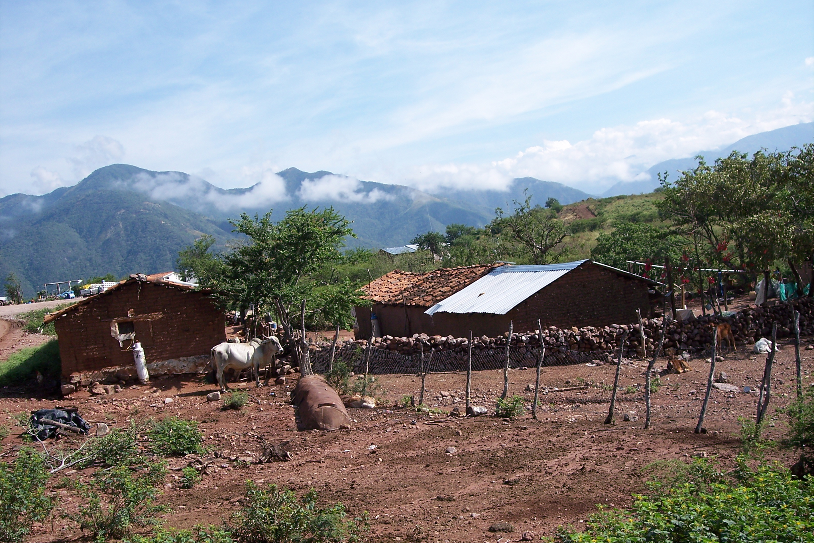 Rancho en Hostotipaquillo, Jalisco, México.